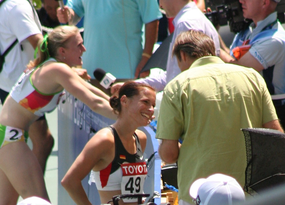 World Athletics Championships 2007 in Osaka - German 100 Meter Runner Verena Sailer is being interviewed